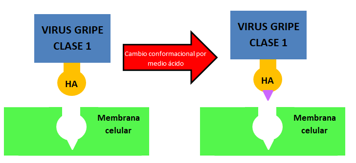 La región HA del virus de la gripe de clase 1 experimenta cambios conformacionales al entrar en contacto con el medio ácido próximo a la célula. Estas modificaciones permiten que se dé la unión entre el virus y la célula y, por lo tanto, su infección.